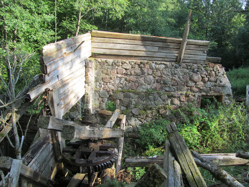 Зарачча. Вадзяны млын